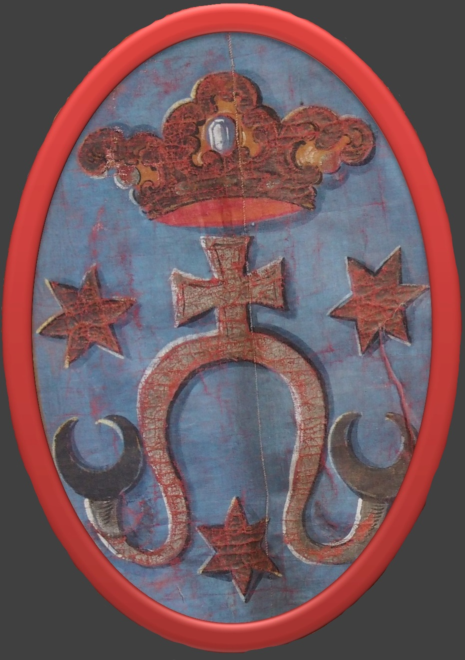 Das Wappen wurde einer Fahne von 1775 entnommen. Das Zeichen mit Kreuz auf dem Wappen ist beinahe identisch mit dem Viehbrandzeichen von Girelsau 1826 (Carl Franz Köch, Abbildungen der in den sächsischen Ortschaften bestehenden Viehbrandzeichen ..., 1826